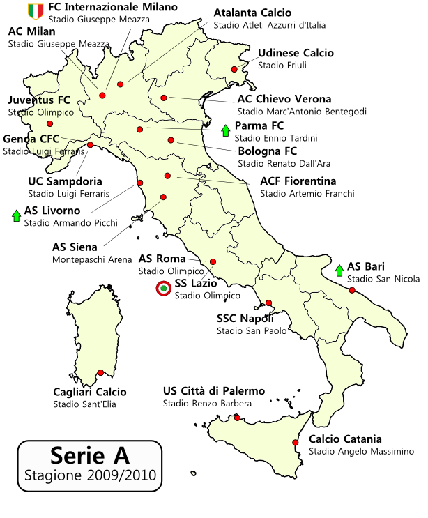 Distribuzione geografica squadre Serie A 2009-2010